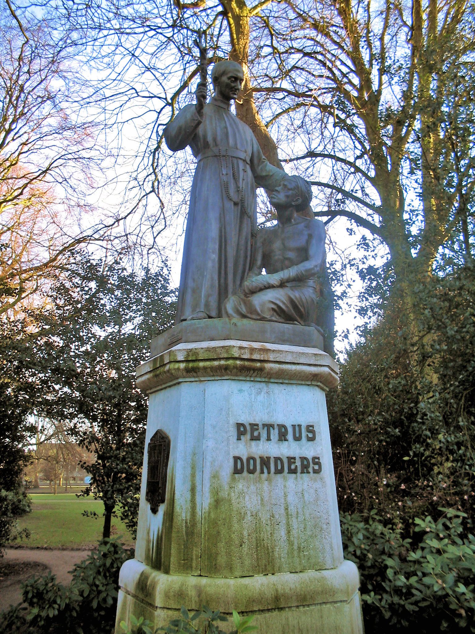 Tilburg, statue of Petrus Donders made around 1926 by J.P. Maas en Zonen (Haarlem)